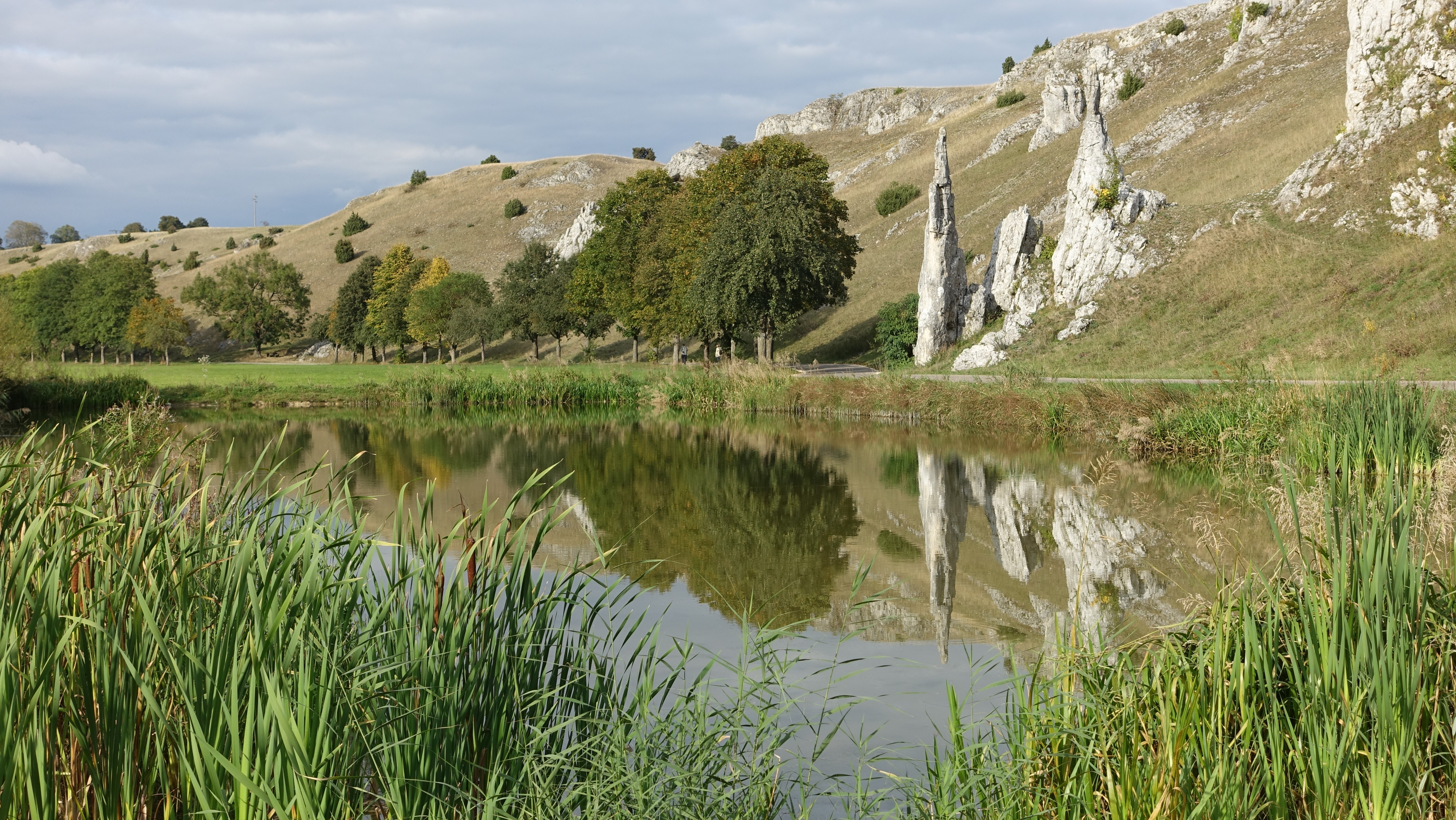 Herbrechtingen - Eselsburger Tal, Steinerne Jungfrauen_02